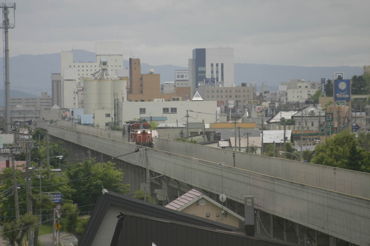 春光町から北見市中心部方向